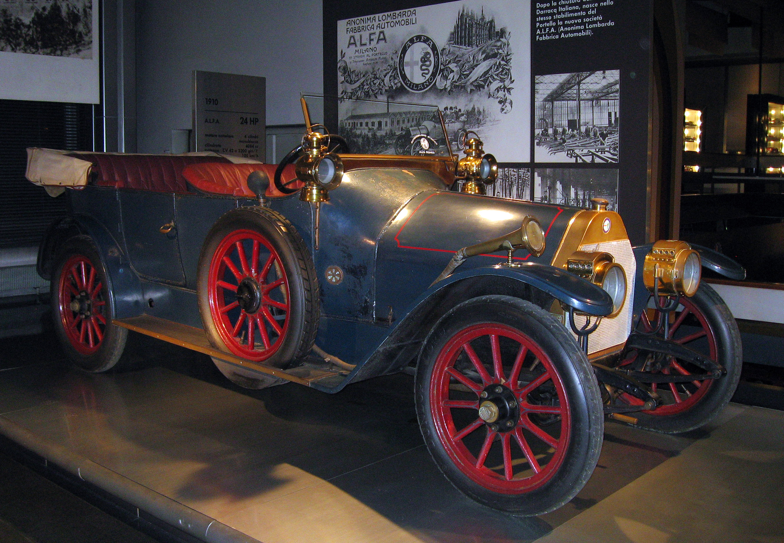 Alfa 24 HP